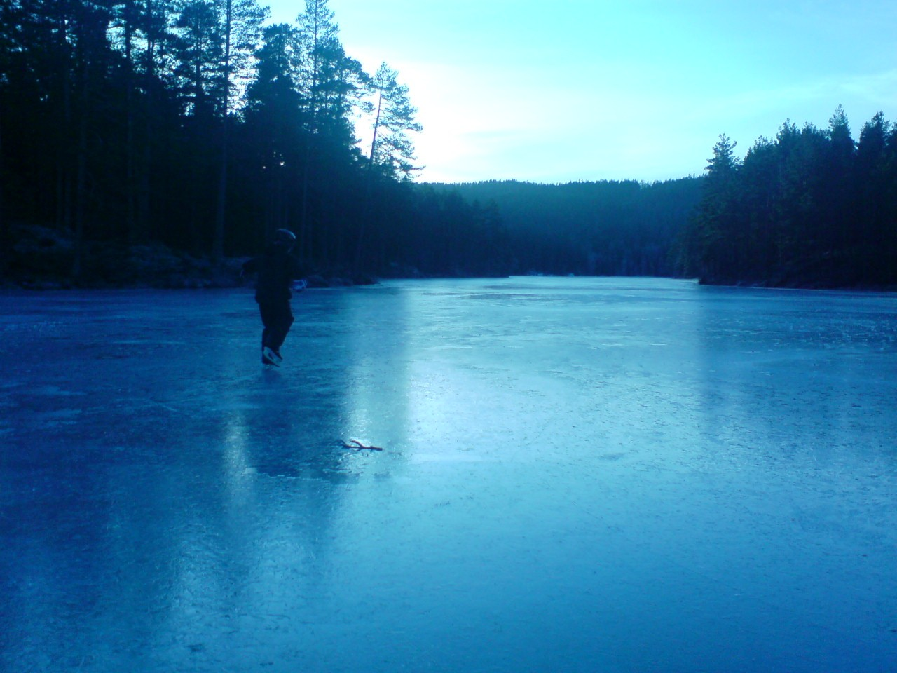 Skøyteis på Langvannet på Lierfoss i Aurskog-Høland kommune.